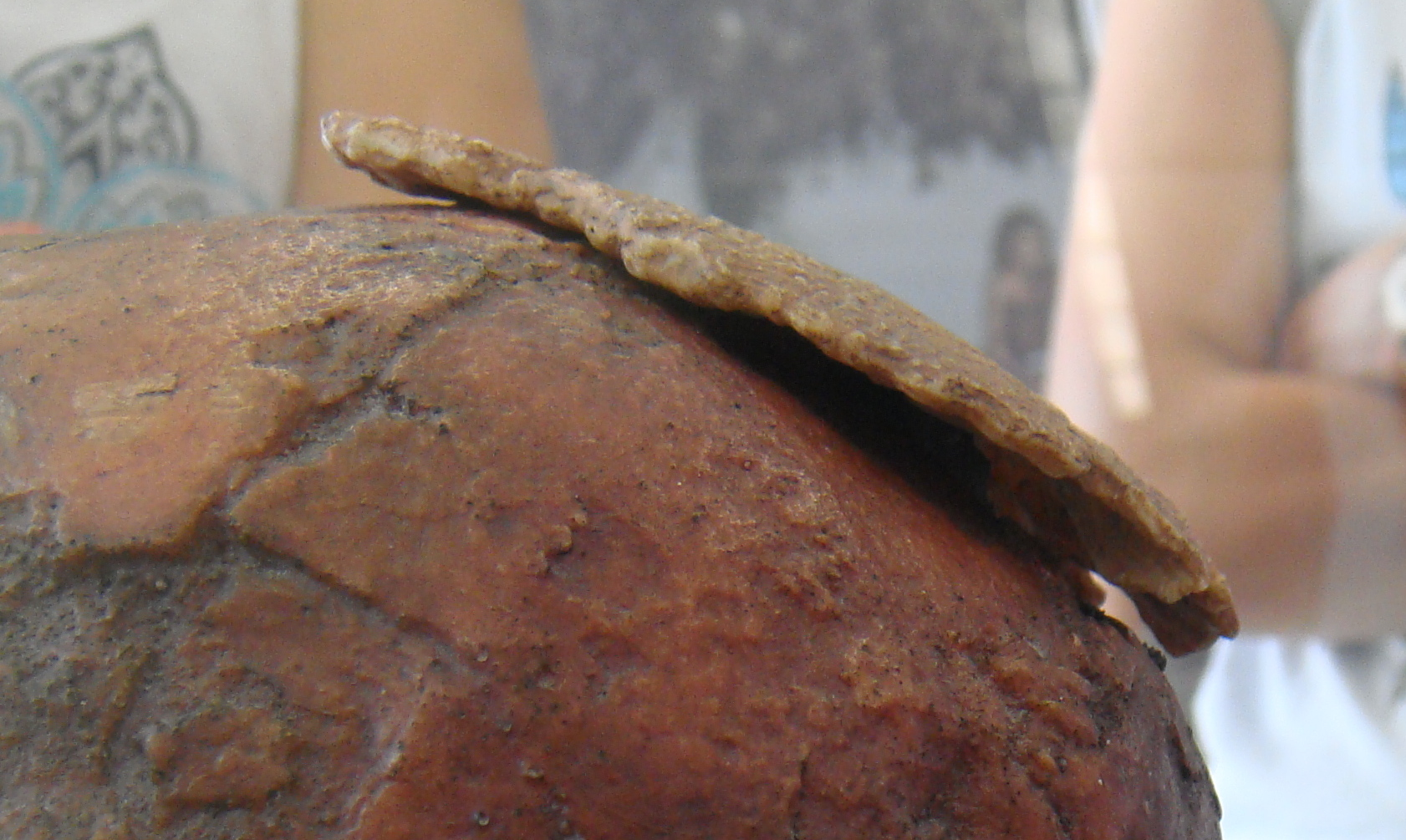 Museo de Prehistoria de Orce